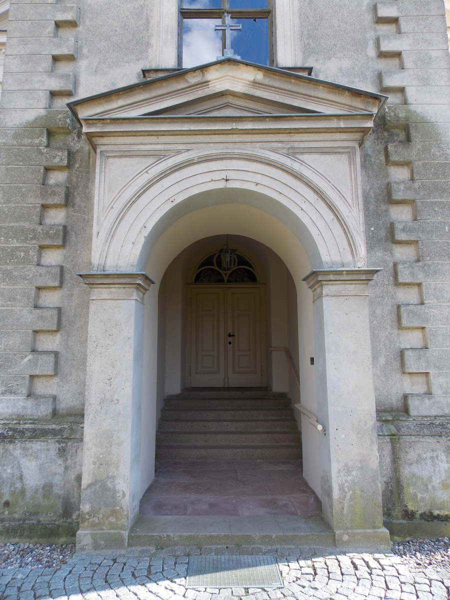 Eingangsportal, Gutskirche Melkof